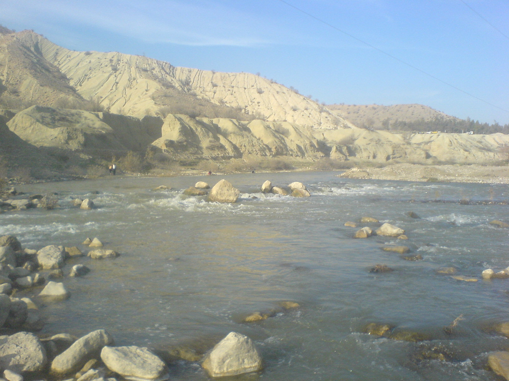 Seymareh River, Ilam رود سیمره نزدیک پل